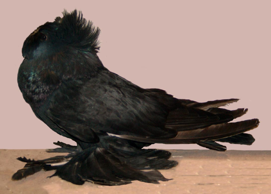 Self black Bokhara Trumpeter pigeon